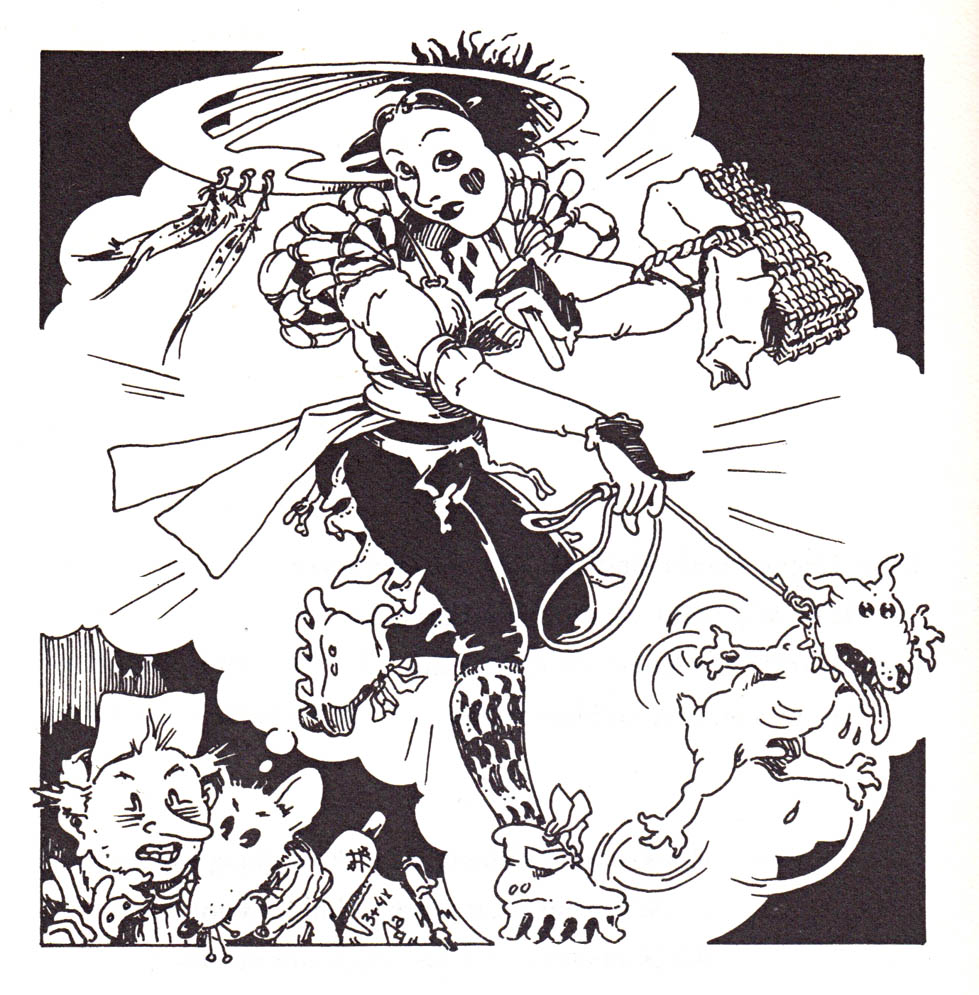 Illustratie uit "De Jacht op de Strok" Cover van "Het Complete Alsjemaar Bekend Band Boek"